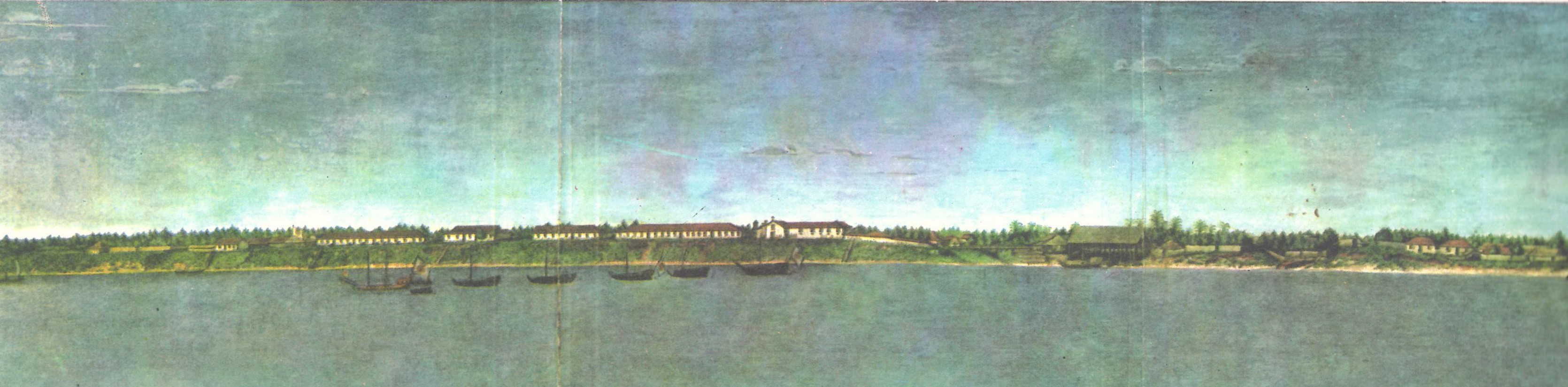 Ilustração em Viagem Filosófica pelas capitanias do Grão Pará, Rio Negro, Mato Grosso e Cuiabá.